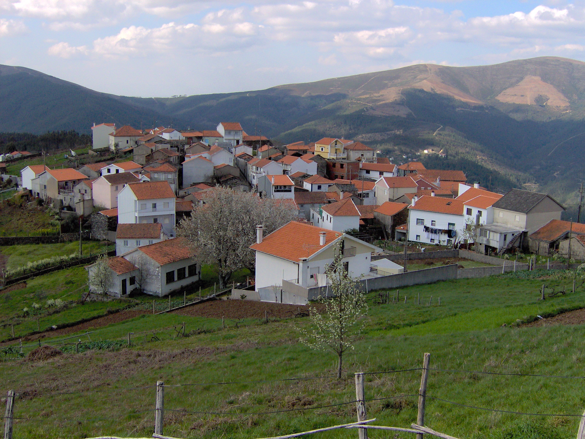 Jorge Alexandre Vicente Fernandes